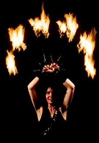 Aufgeklappte und brennende Feuerfächer über dem Kopf gehalten